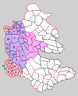 筑波郡の町村